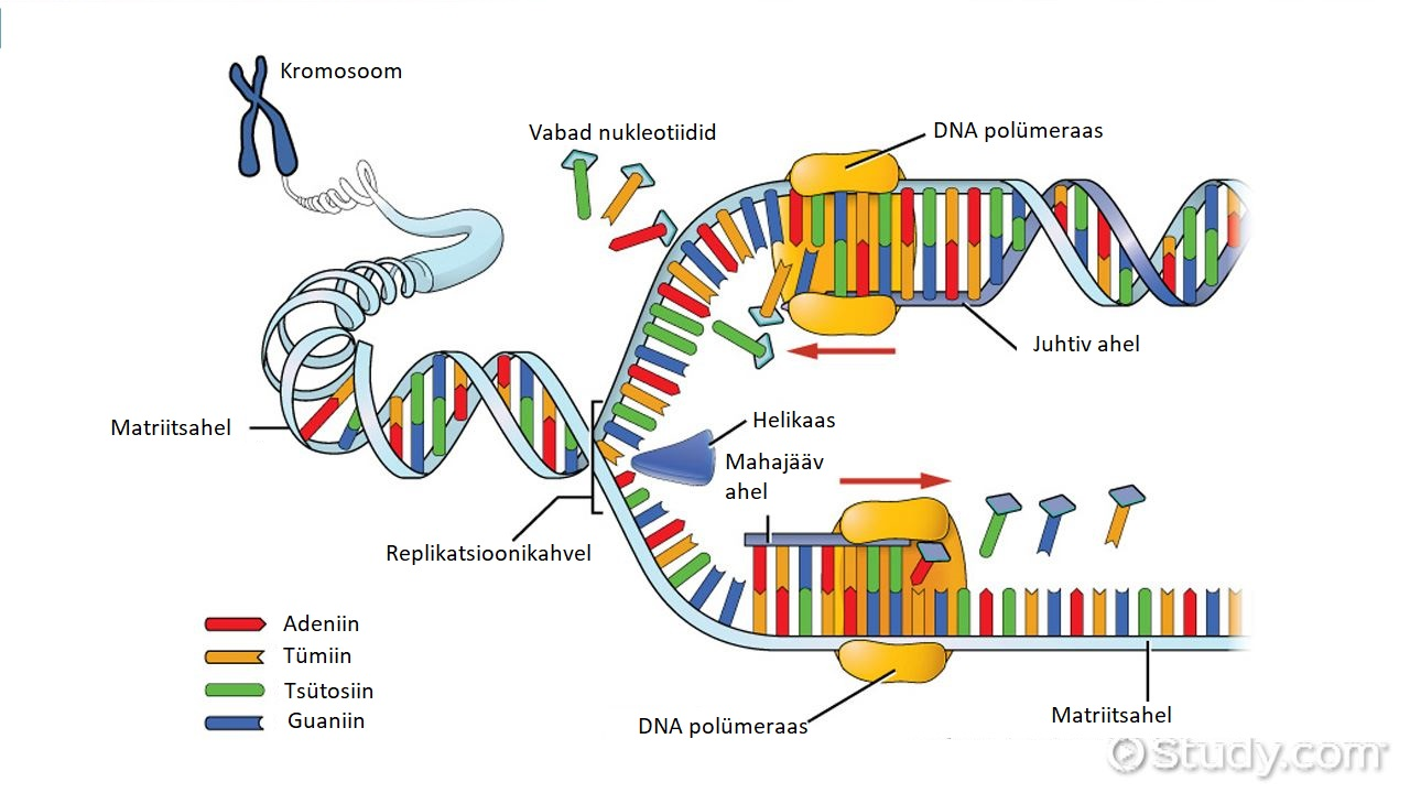 DNA polümeraas